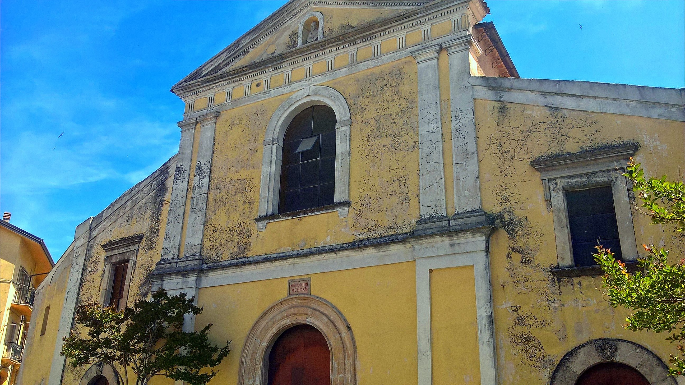 La Chiesa patronale di San Biagio